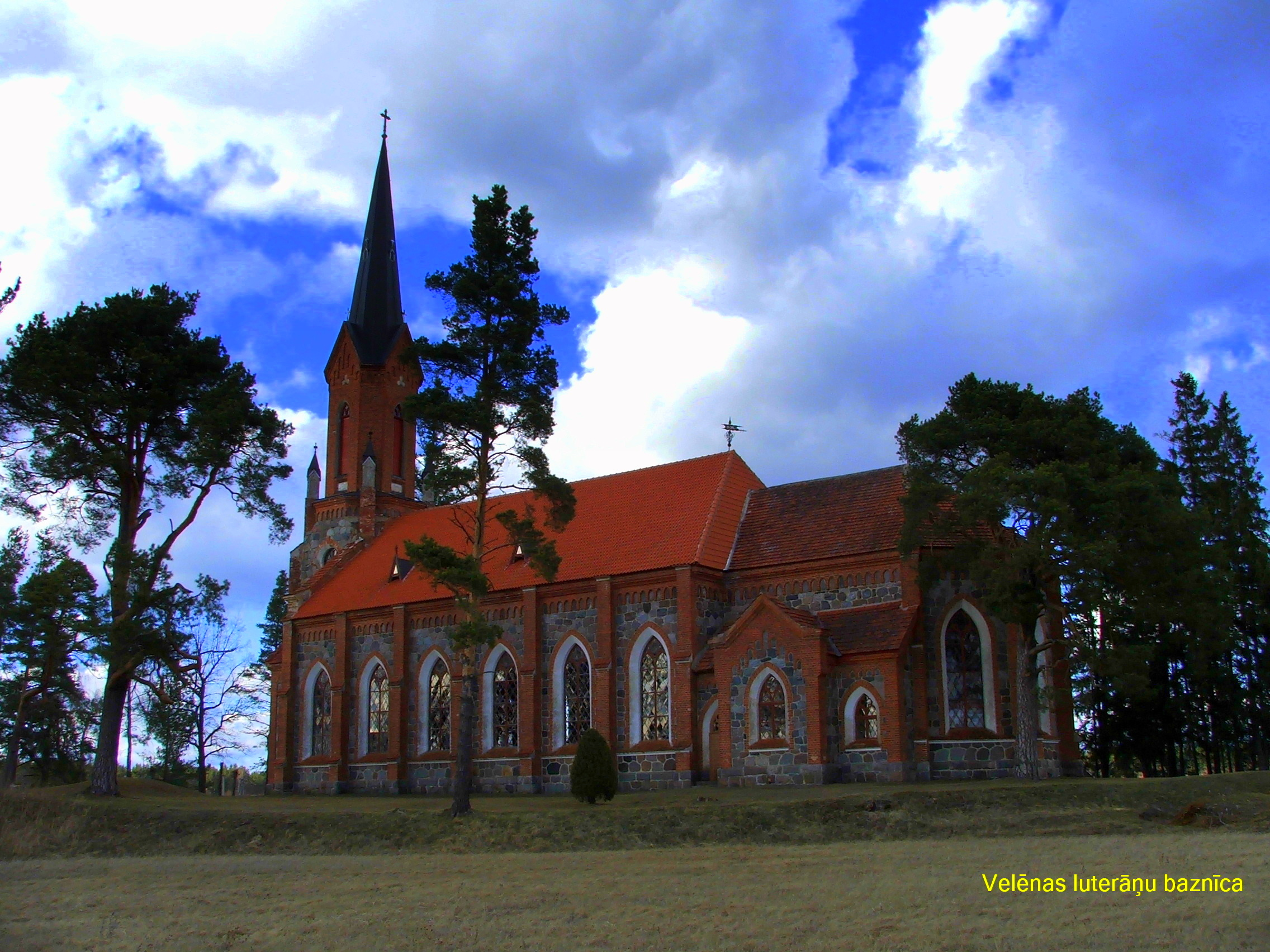 Velēnas luterāņu baznīca, Velēna